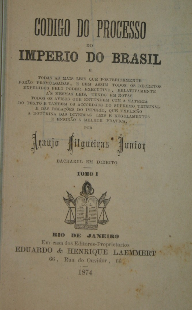 Foto da página de um exemplar do Código do Processo Criminal de 1832, publicado em 1874.